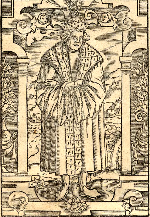 Popelus Primus